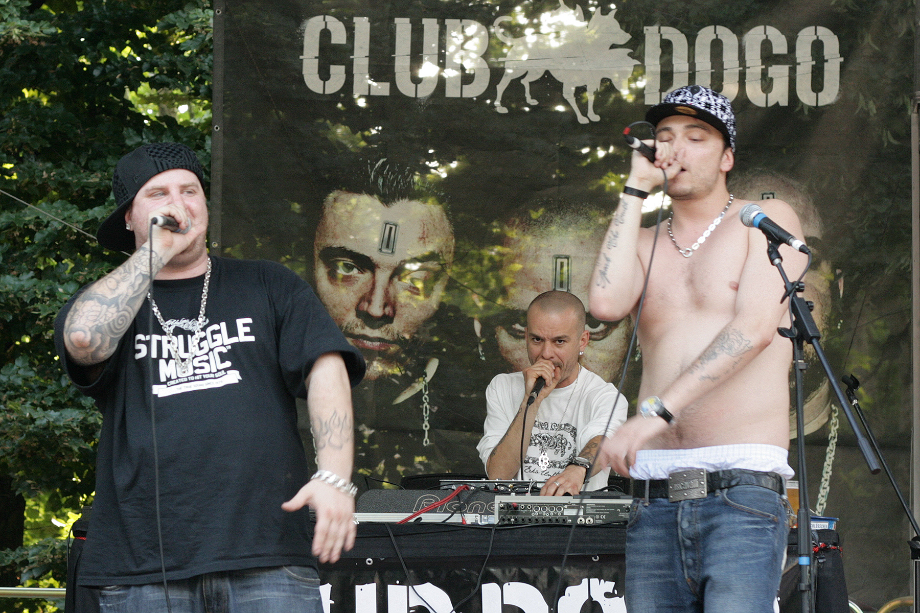 Il gruppo rap italiano Club Dogo